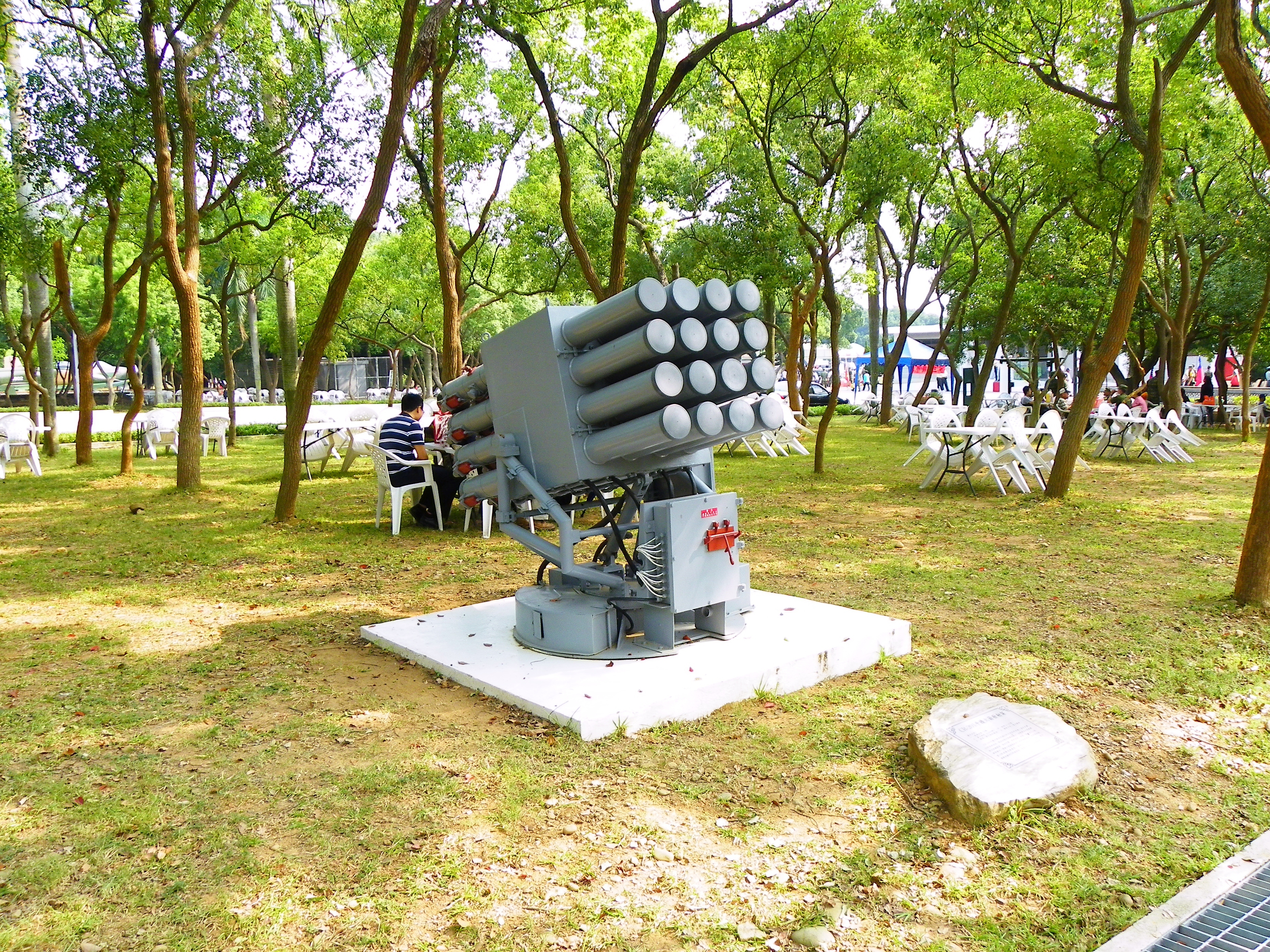 成功嶺忠誠二路北面展示的海軍CR-201干擾火箭發射架。CR-201干擾火箭為中科院1976年開始研發，1979年試射成功，裝備於老陽字號驅逐艦，以投射干擾裝置妨礙潛艦水中偵搜及誘餌等用途。2006年老陽字號驅逐艦全部除役後，部分裝備於高速人員運輸艦。